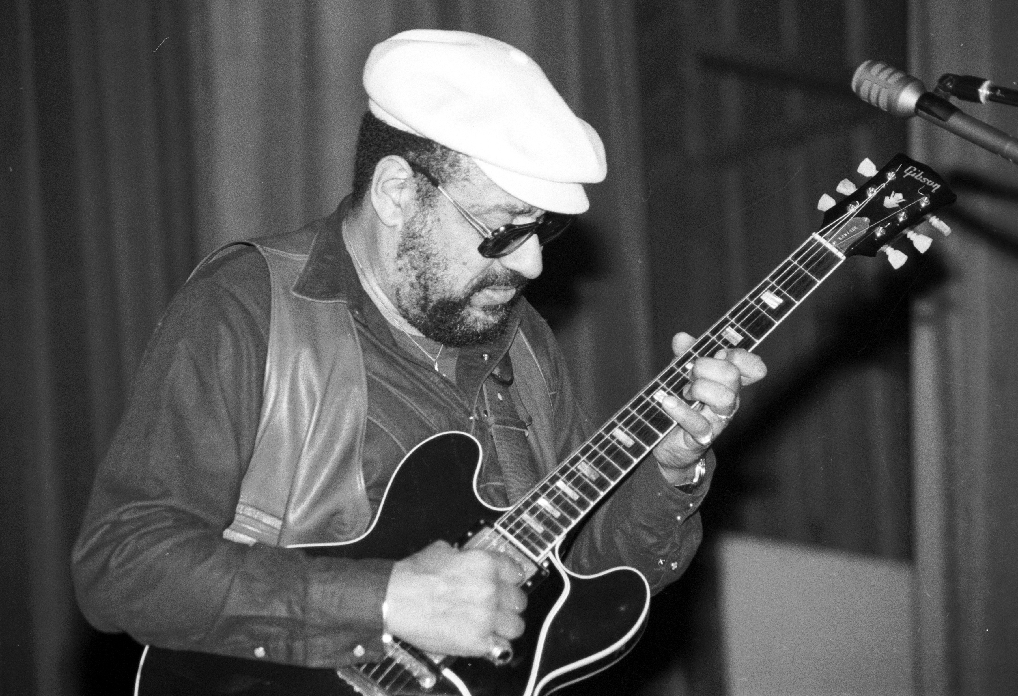 Le guitariste américain de blues Mickey Baker en concert à Morlaix (Bretagne, France) en 1982.